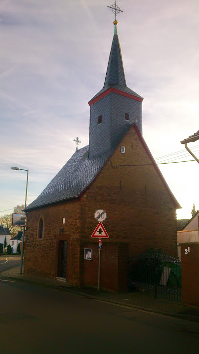 Kapelle St. Barbara